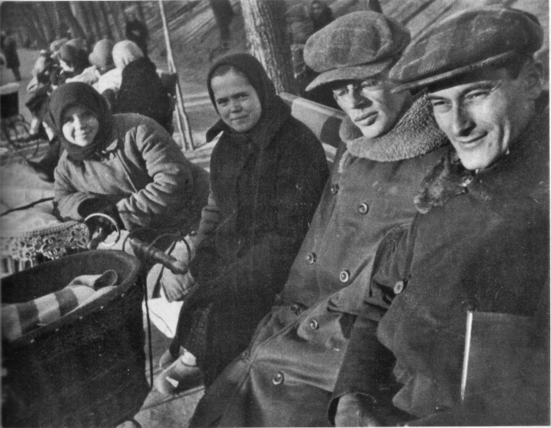 Ильф и Петров на Гоголевском бульваре. Зима 1932